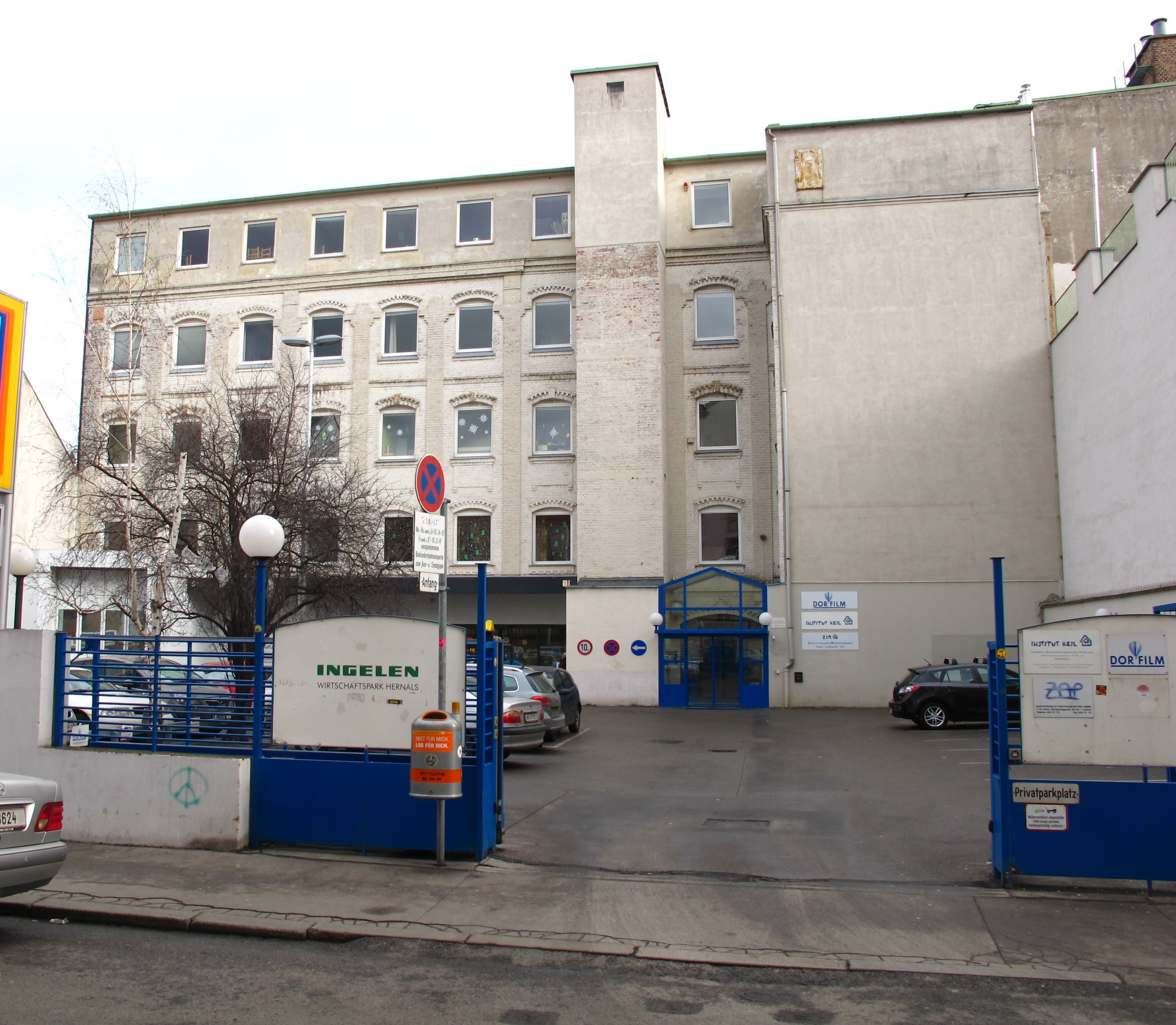 Ingelen Wirtschaftspark Hernals. Ehemaliger Standort und Gebäude der Firma Ingelen, Elektrotechnische Fabrik Ing. Ludwig Neumann GmbH